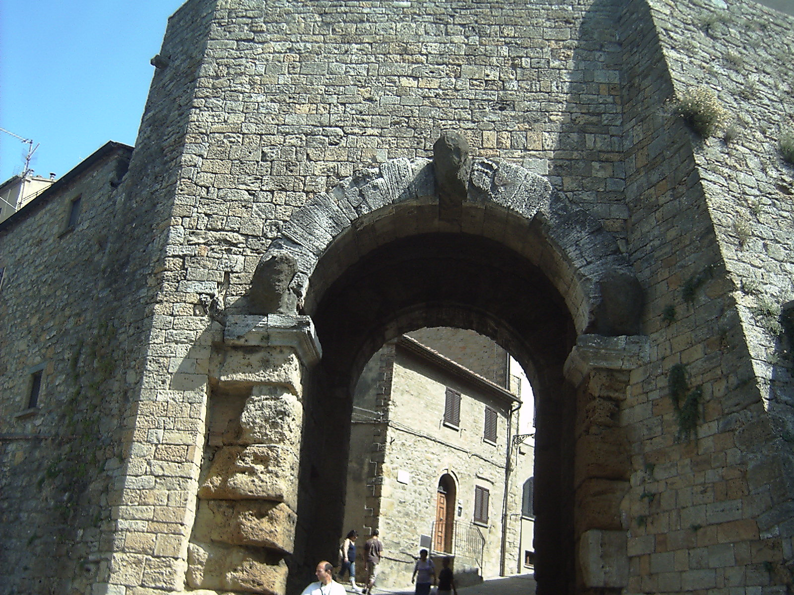 Foto scattata dal sottoscritto a Volterra , Toscana , Italia il 22 luglio 2007 raffigurante la etrusca Porta dell'Arco situata nel centro storico di Volterra